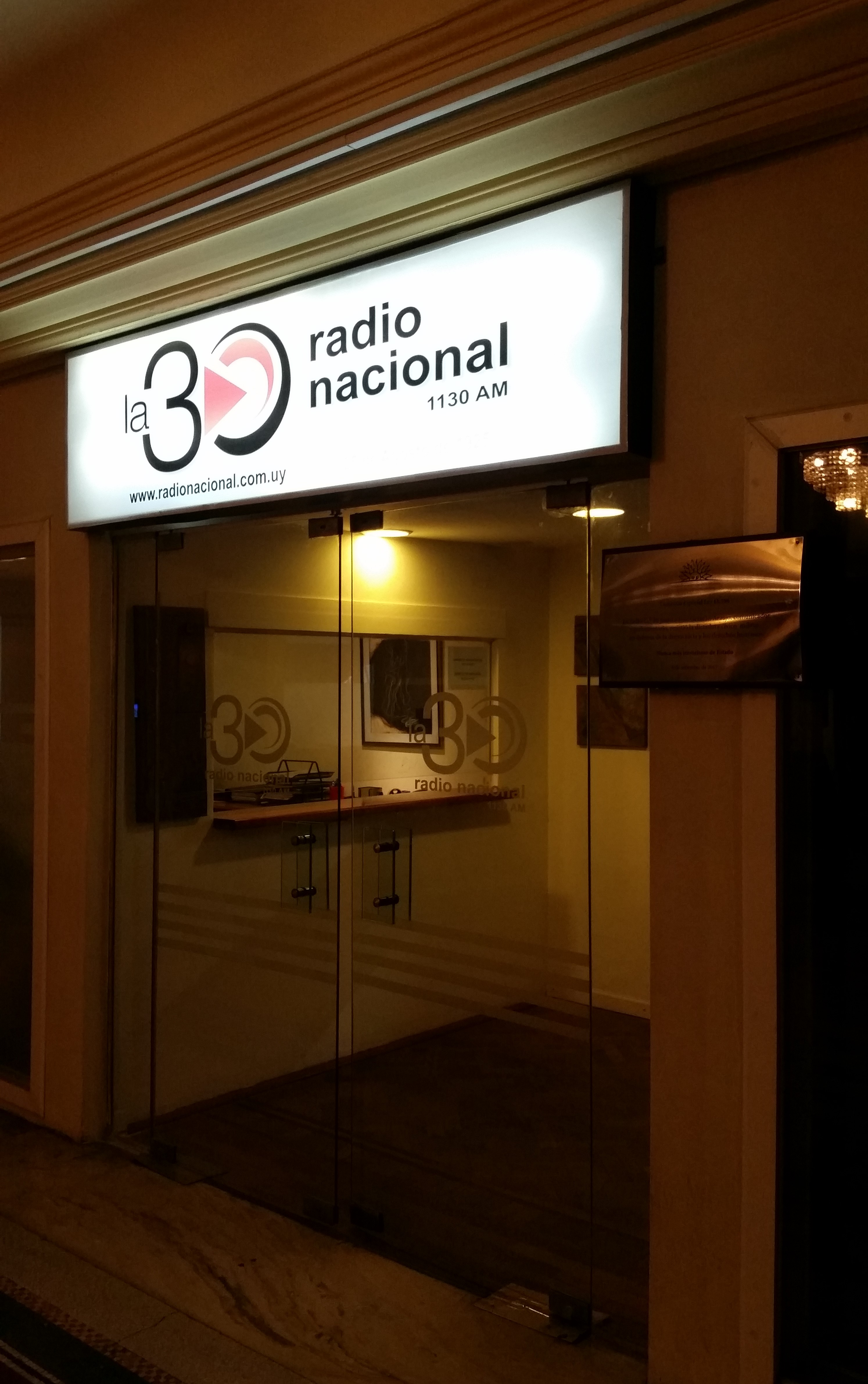 La radio CX 30 junto a José Germán Araujo, comunicador y parlamentario, resistió la dictadura cívico - militar en defensa de la democracia y los derechos humanos. Nunca más terrorismo de Estado. 6 de setiembre de 2017